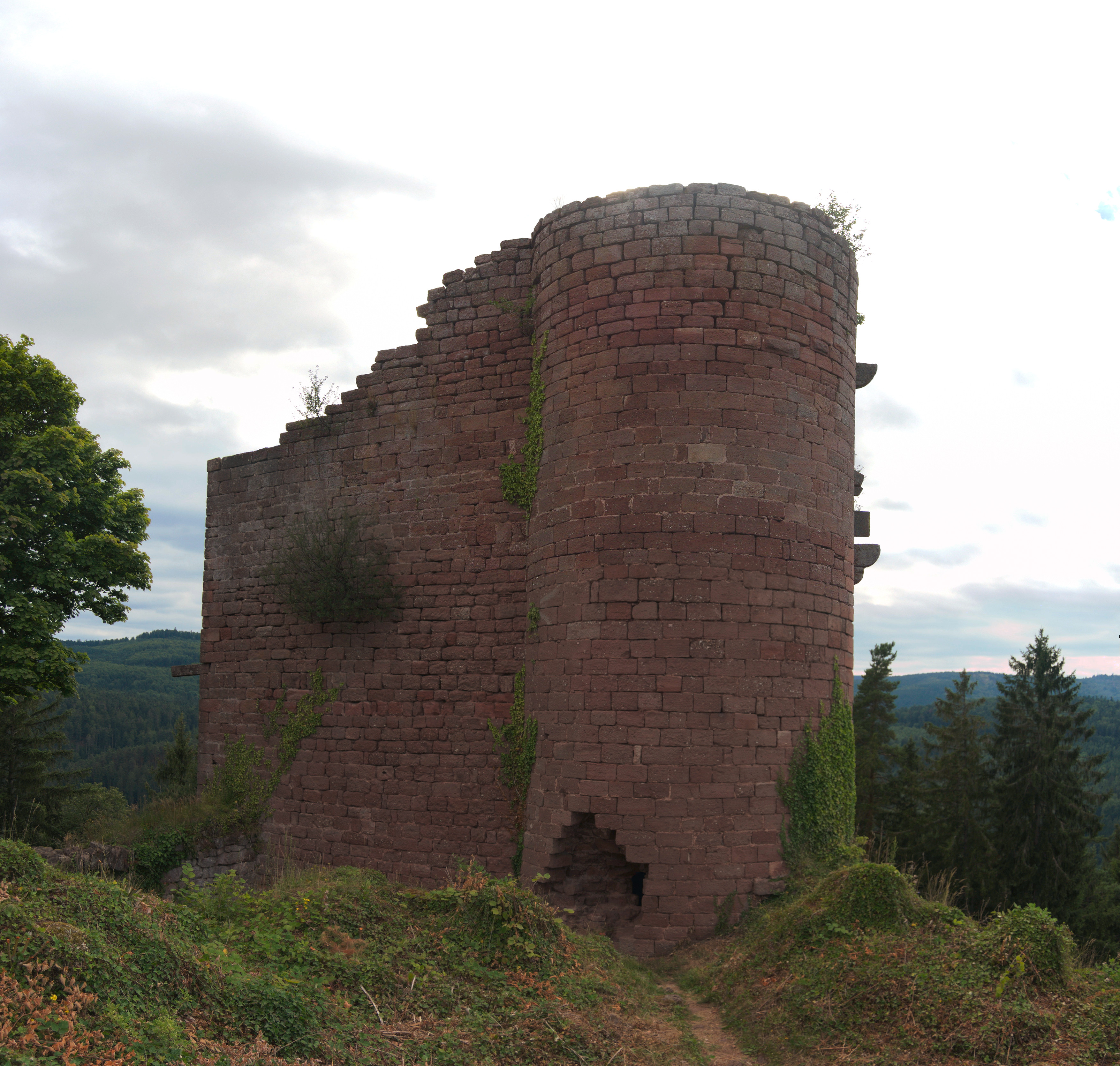 DSC_2381 - DSC_2382